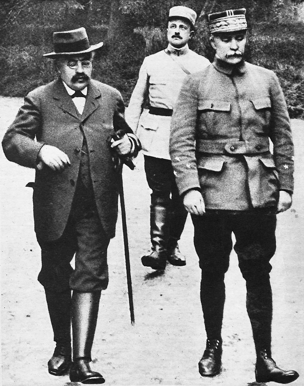 Le ministre de la Guerre Alexandre Millerand et le général Philippe Pétain échangeant sur les modalités de l'attaque de Carency.